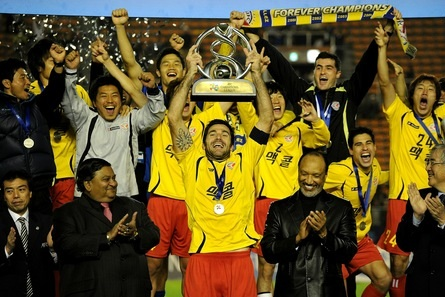 Seongnam Ilhwa Chunma v Zobahan - AFC Champions League